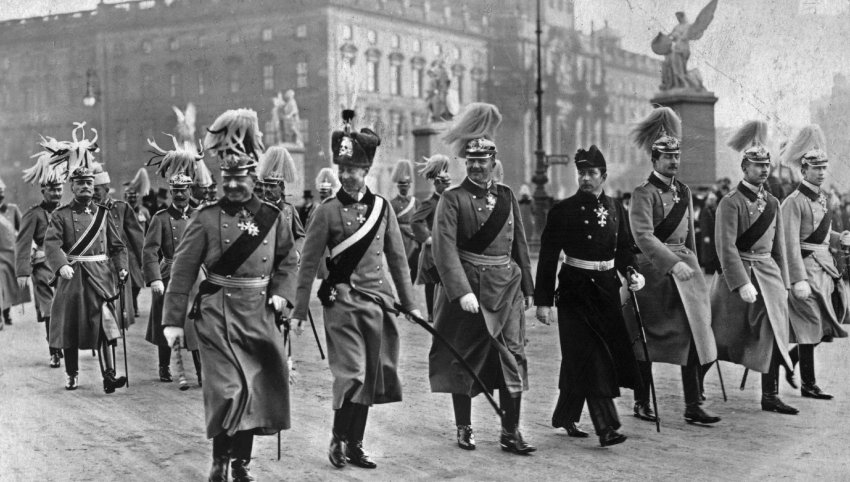 Nach dem diplomatischen Neujahrsempfang im Schloss schreitet Wilhelm der Zweite am 1. Januar 1913 über die Berliner Schlossbrücke mit seinen Söhnen vom Berliner Stadtschloss zum Zeughaus zur Parolenausgabe. Die Personen (v.l.n.r.) Wilhelm II (1859 - 1941), Kronprinz Wilhelm (1882 - 1951), Prinz Eitel Friedrich (1883 - 1942), Prinz Adalbert (1884 - 1948), Prinz August Wilhelm (1887 - 1949), Prinz Oskar (1888 - 1958), Prinz Joachim (1890 - 1920)